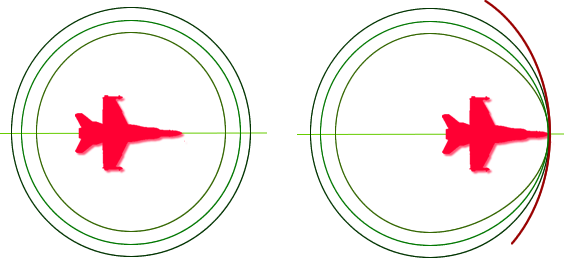 Når et fly bryder lydmuren